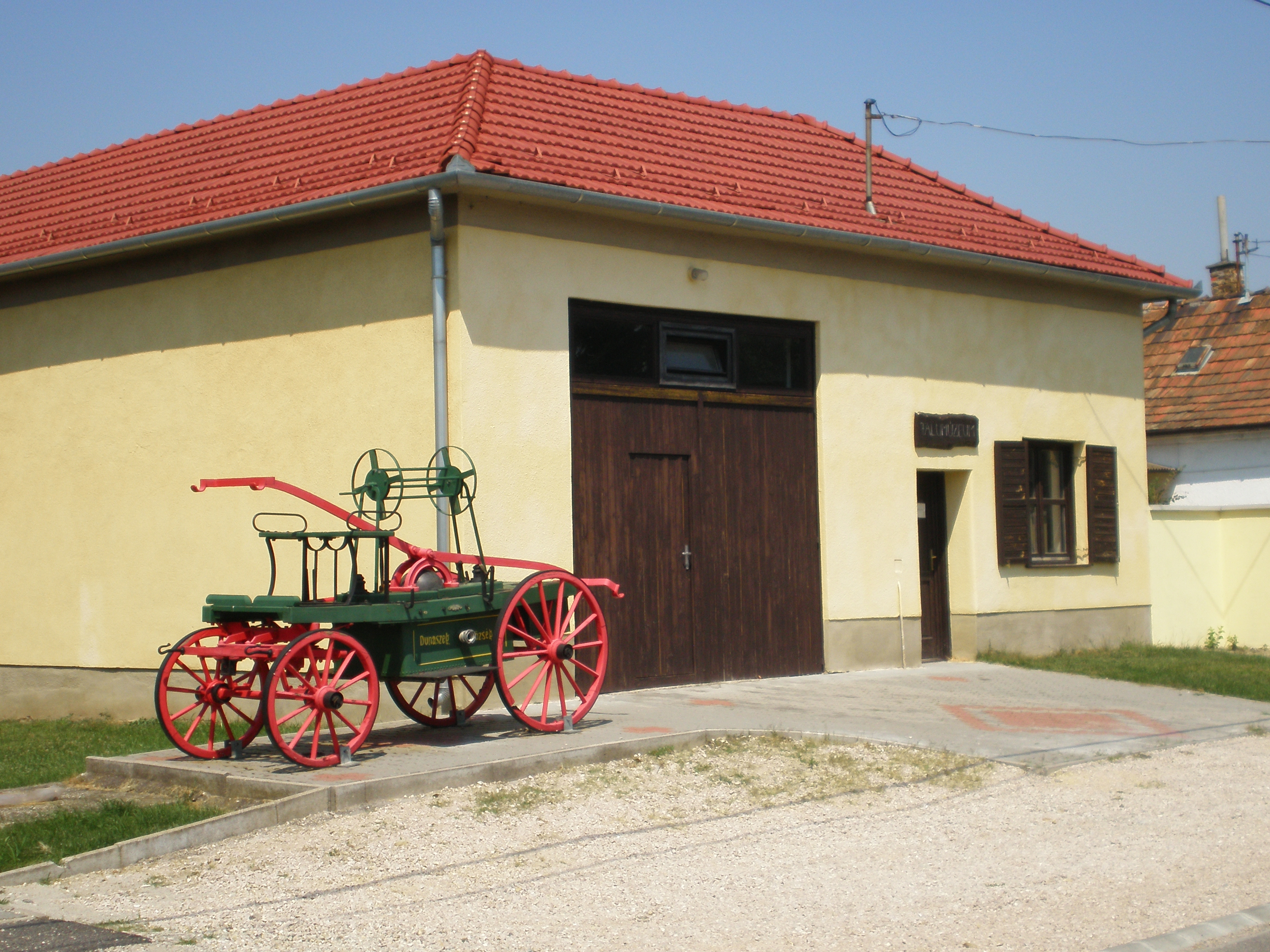 Falumúzeum (Dunaszeg, Győr-Moson-Sopron megye, Magyarország)